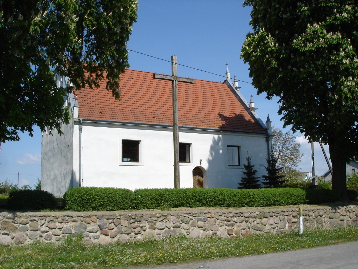 Morzyca - rzymskokatolicki kościół filialny (dec. ruina)Church in Morzyca (Stargard County), Poland 10.1957.